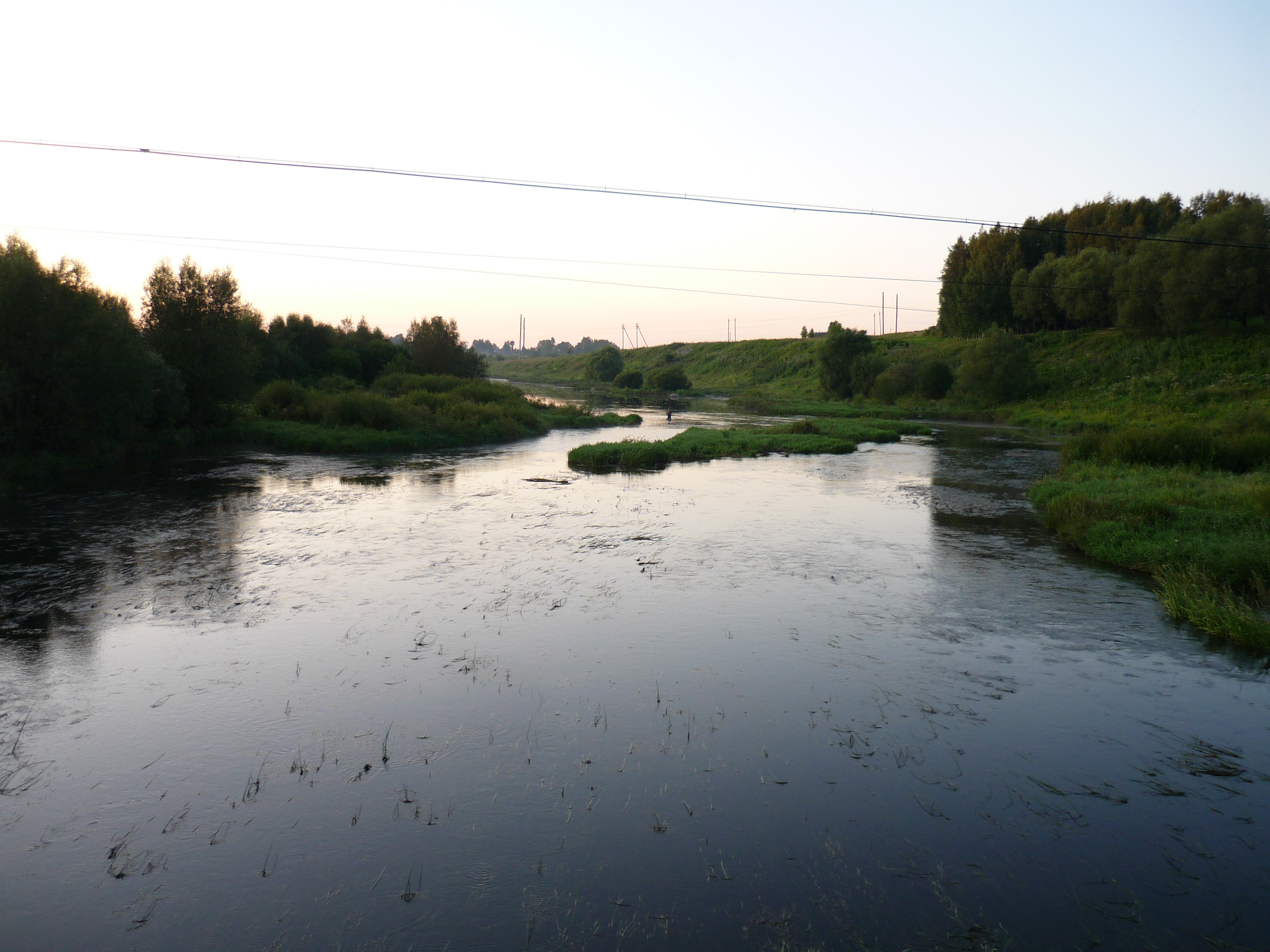 Река вазуза в Сычёвке